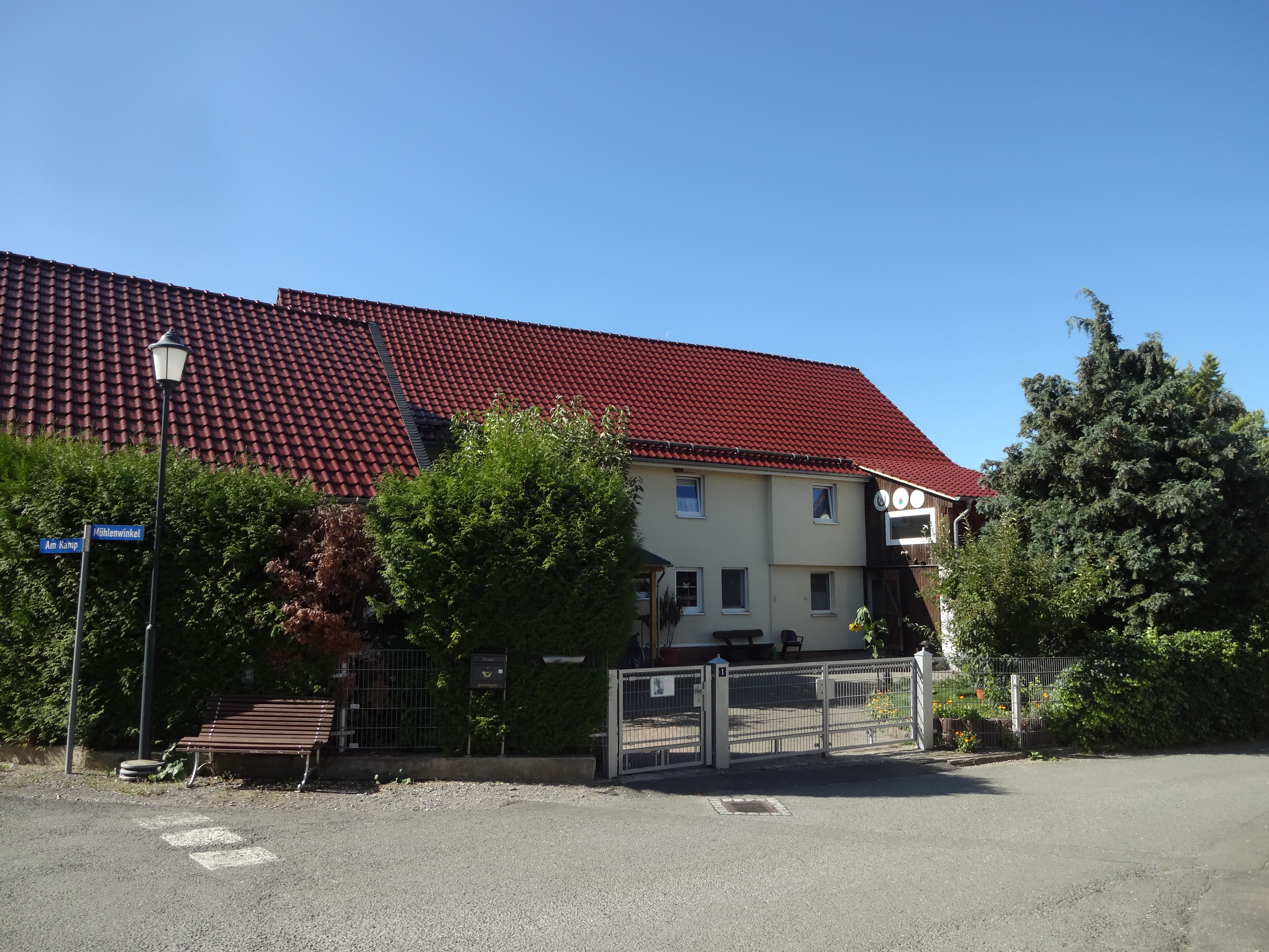 ehemals denkmalgeschütztes Wohnhaus im Mühlenwinkel 1 in Drübeck